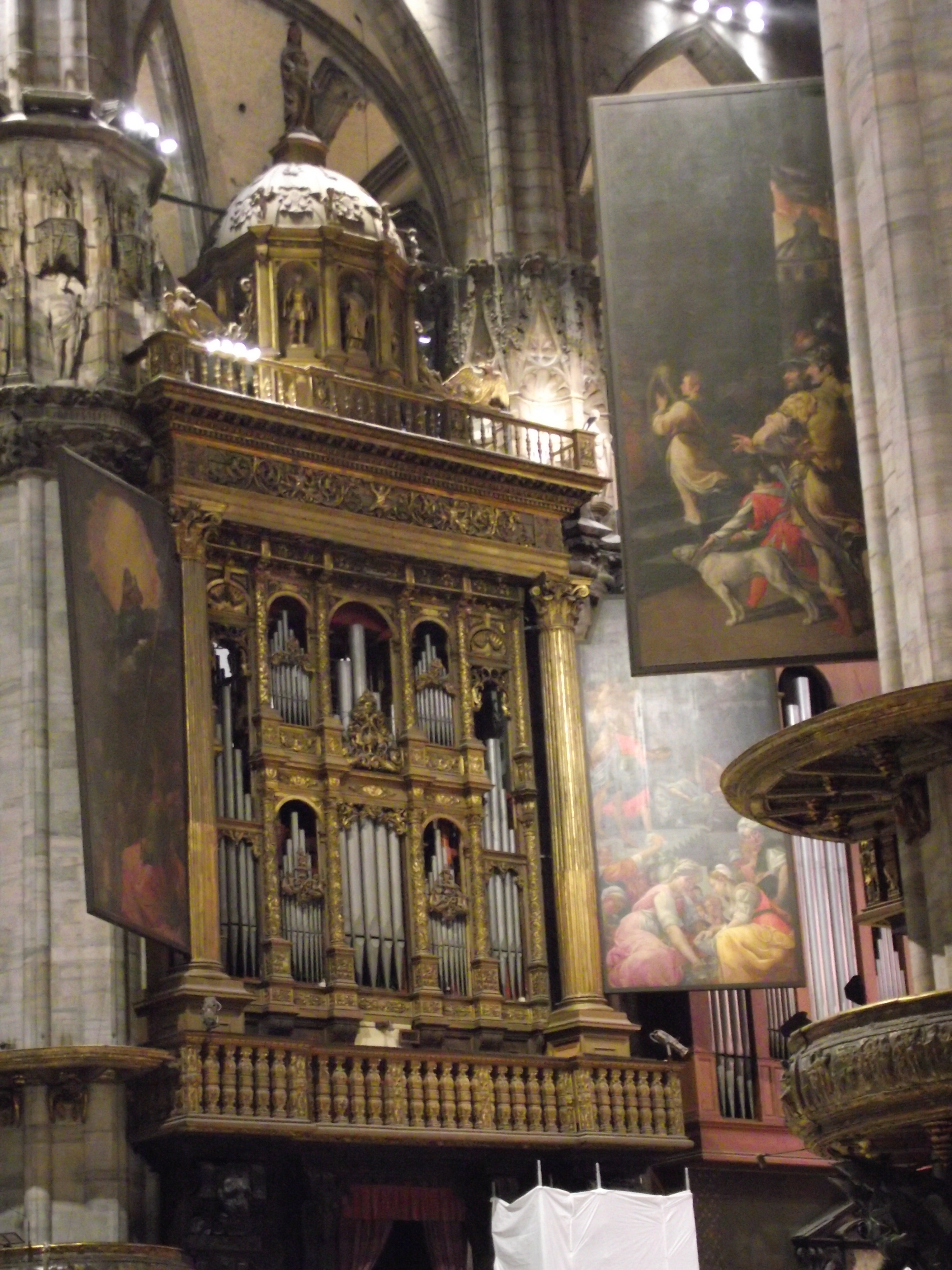 Organo